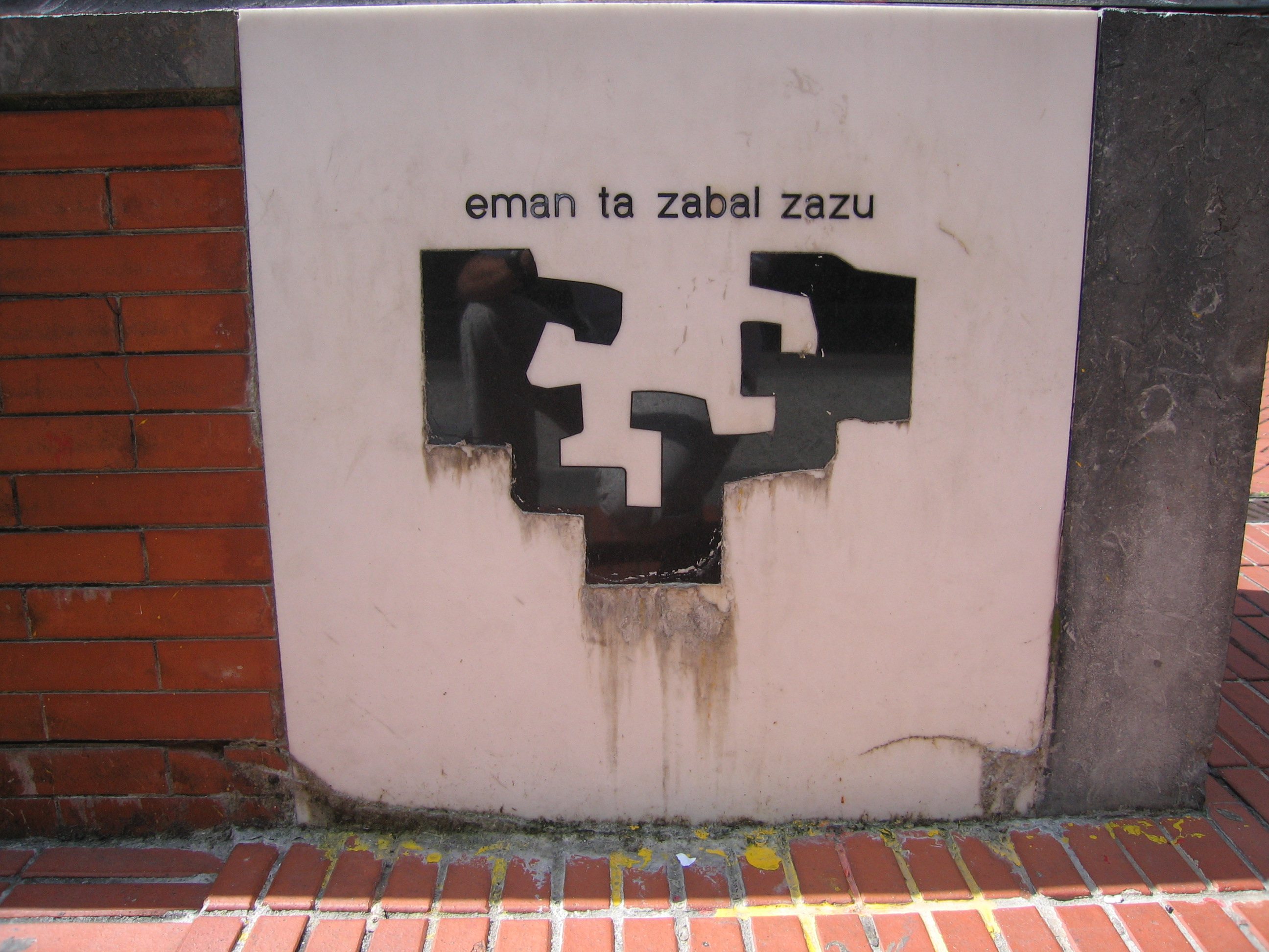 Euskal Herriko Unibertsitateko ikurra